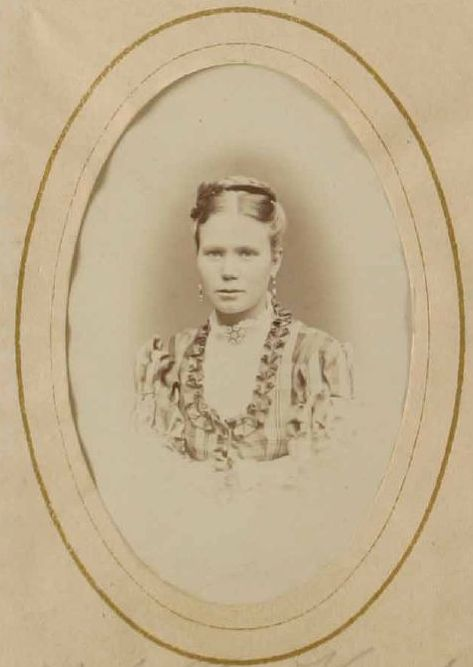 I Polismuseets samlingar finns ett fotoalbum bevarat där Sedlighetspolisen samlat bilder på några av de kvinnor som var reglementerade. Kvinnan på den här bilden var inskriven vid Prostitutionsbyrån mellan 1863 och 1881 då hon dog på ett sjukhus på Södermalm.